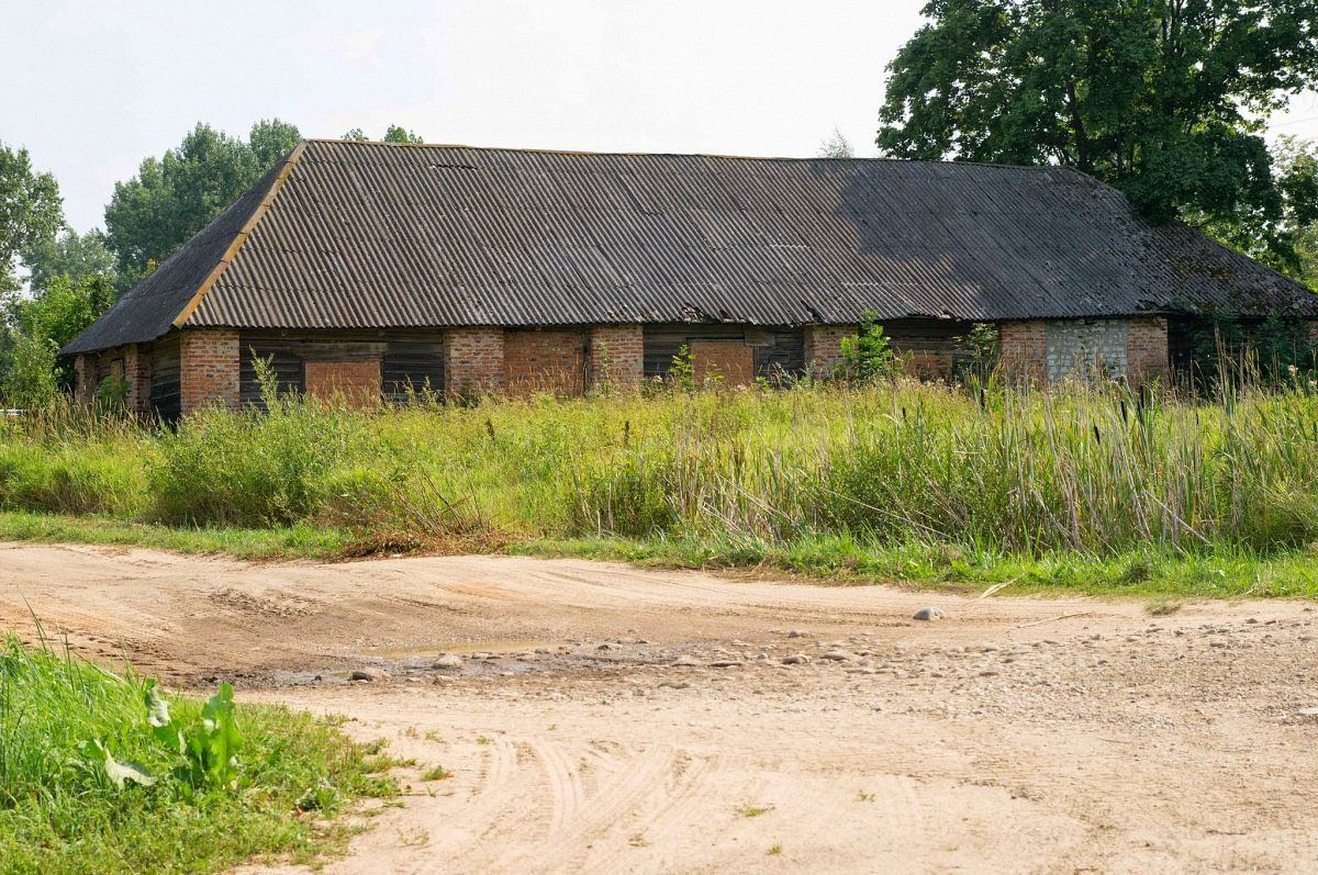 Крулеўшчына. Гаспадарчая пабудова на тэр. былой в. Янушэва